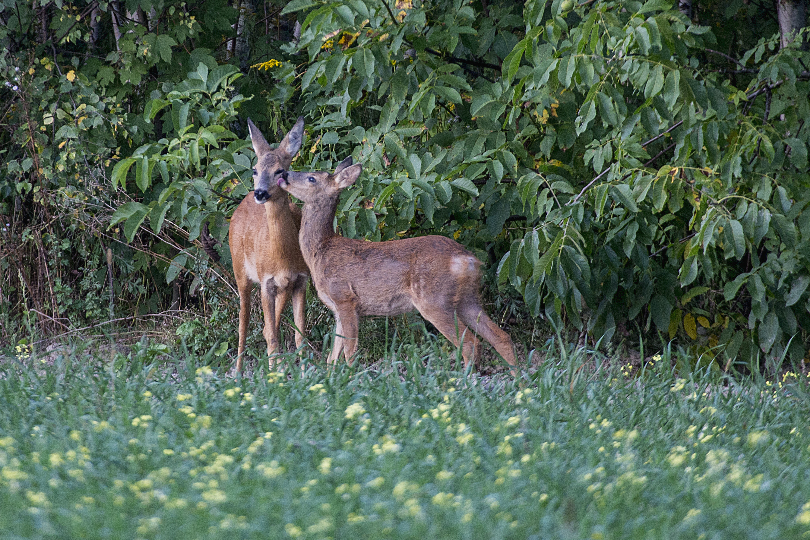 Lodz, Poland